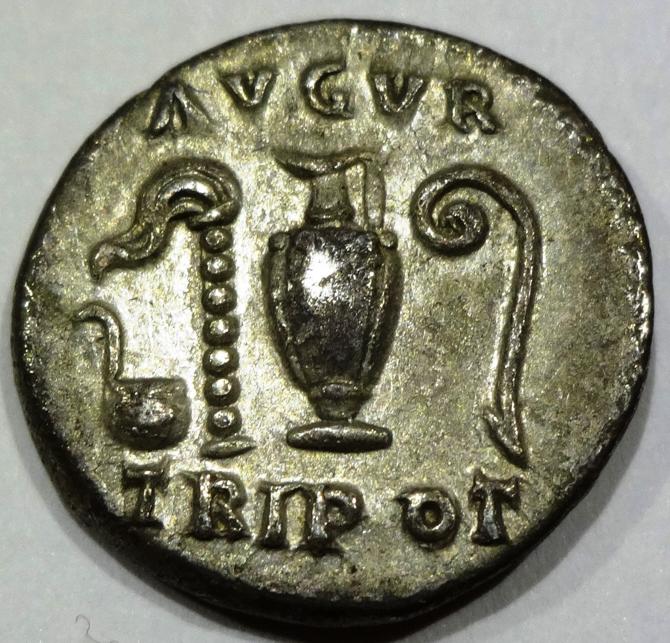 Rückseite eines Denar Vespasians mit dem Titel AVGVR und dem Hinweis auf die Tribunizische Macht (TRI[BUNICIA] POT[ESTAS]) des Kaisers. Abgebildet sind priesterliche Geräte. Diese Münzbeschriftung wurde für Vespasian zwischen den Jahren 71 und 73 eingesetzt (so RIC 2,12, S. 108, Anm. 132 zu Nr. 698).